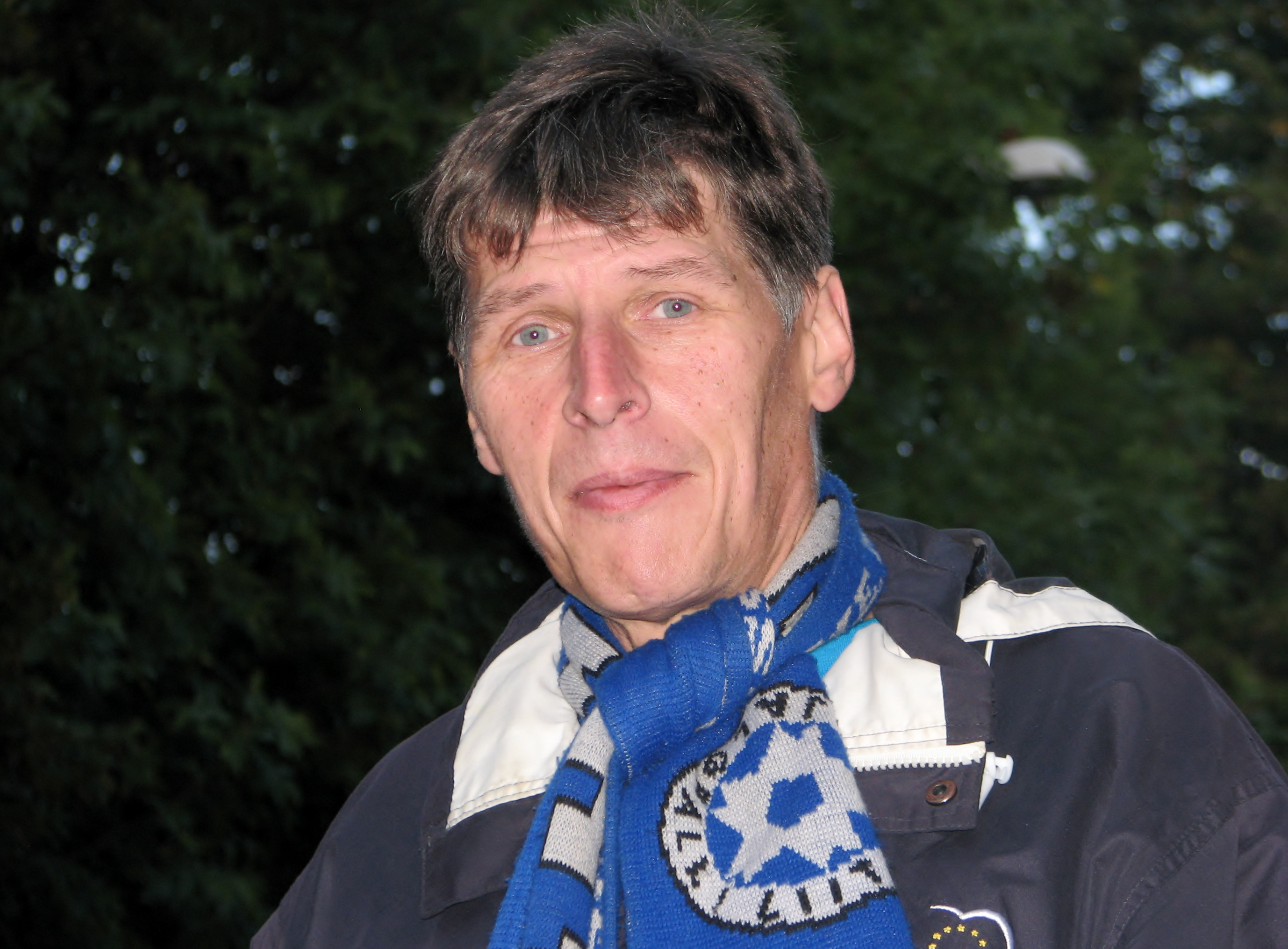 Aivar Kivisiv Tallinna kesklinnas